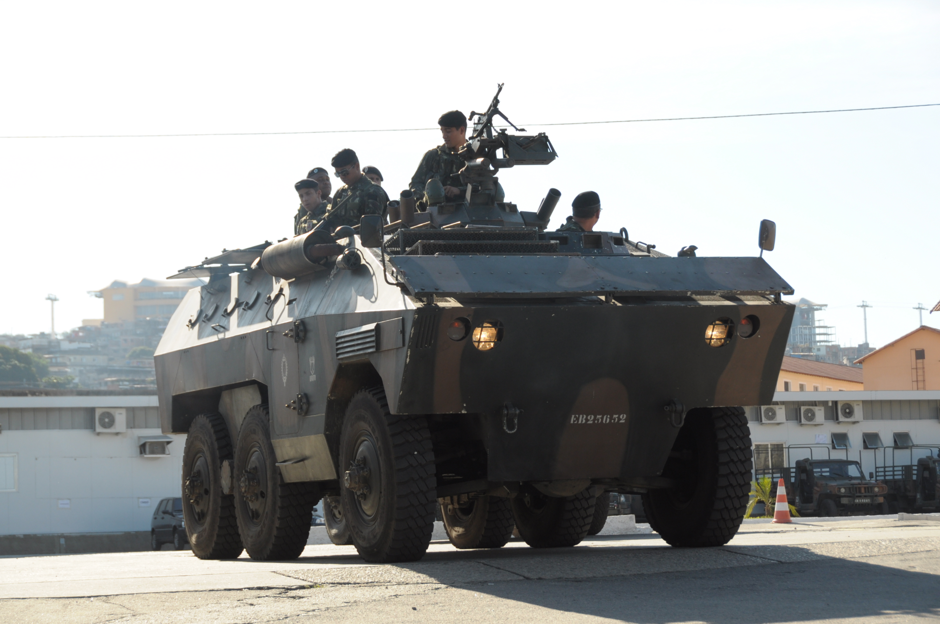 15RcMecEs (15º Regimento de Cavalaria Mecanizado - Escola)